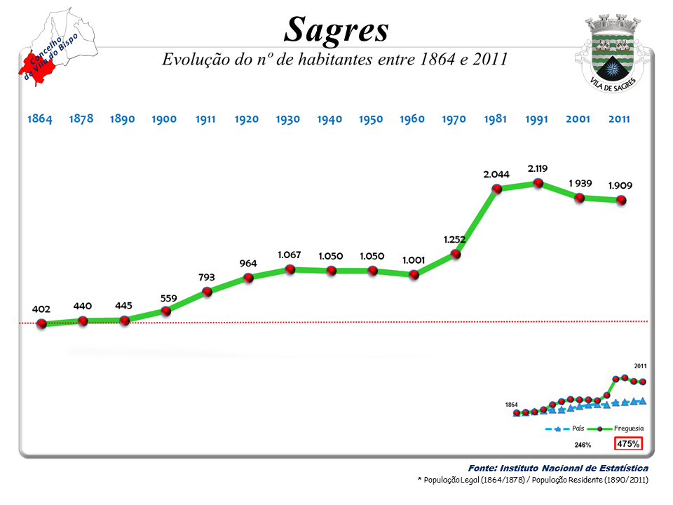 Censos 1864/2011